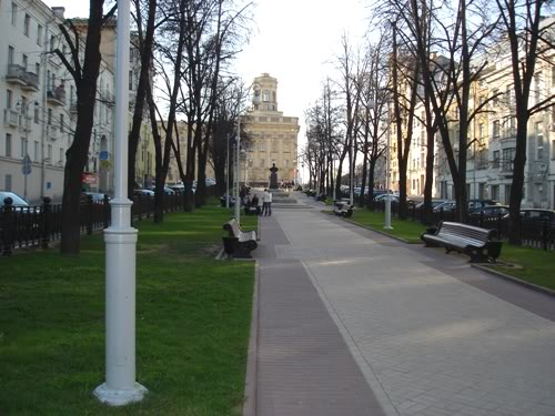 Бульвар на ул. Комсамольской